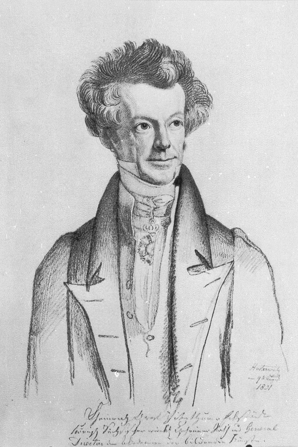 Bildnis des Heinrich Graf Vitzthum von Eckstädt